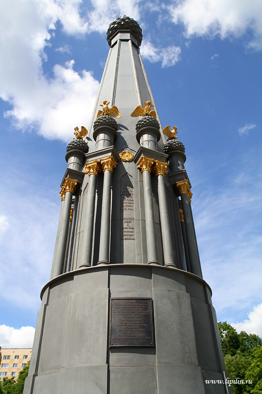 Полацк. Помнік Героям вайны 1812 года